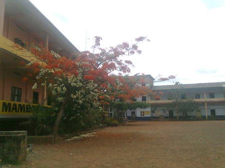 മമ്പറം ഹയര്‍സെക്കന്‍ഡറി സ്കൂള്‍